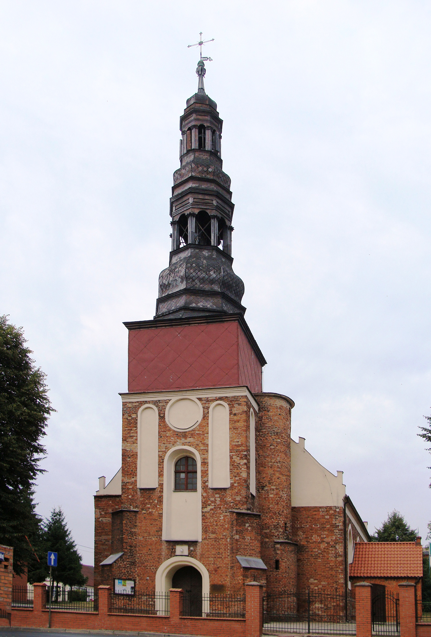 Koronowo, kościół fil. p.w. św. Andrzeja, kon. XIV, XVI